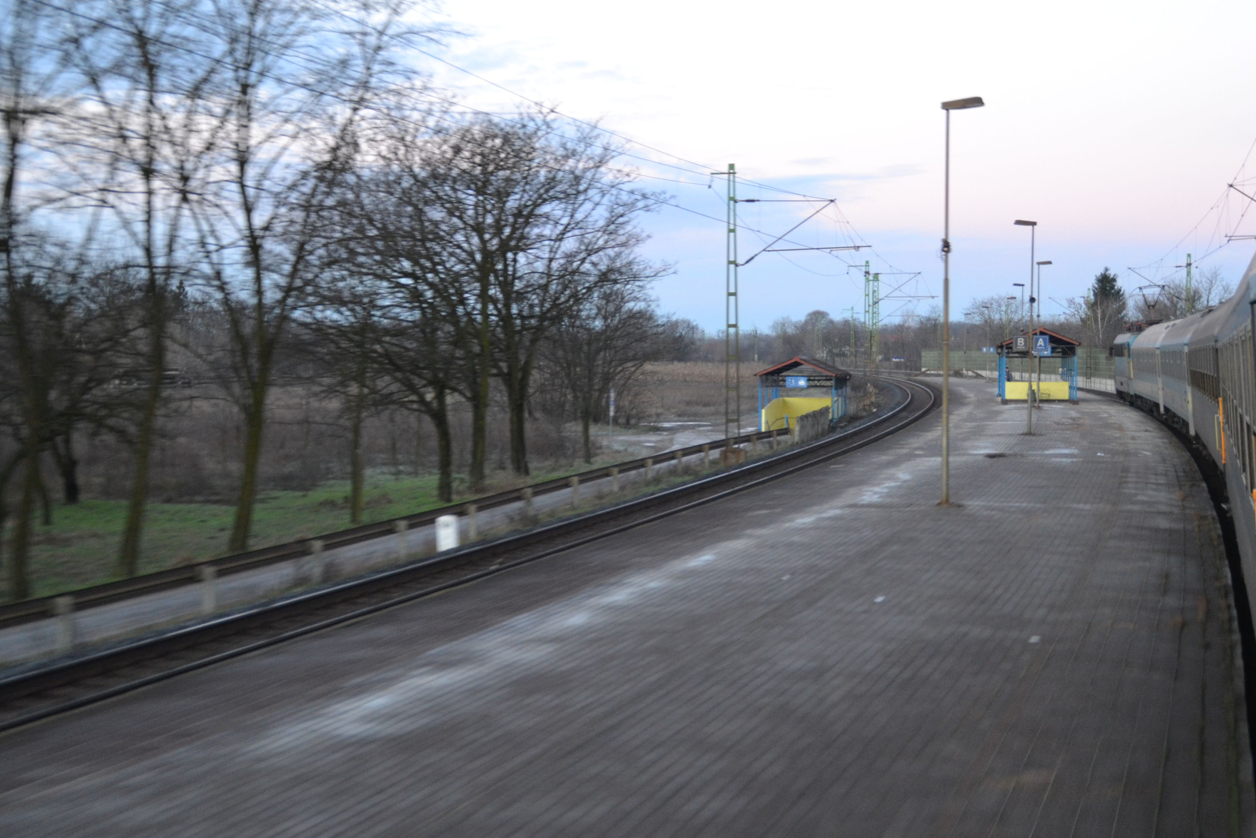 Budai út vasúti megálló